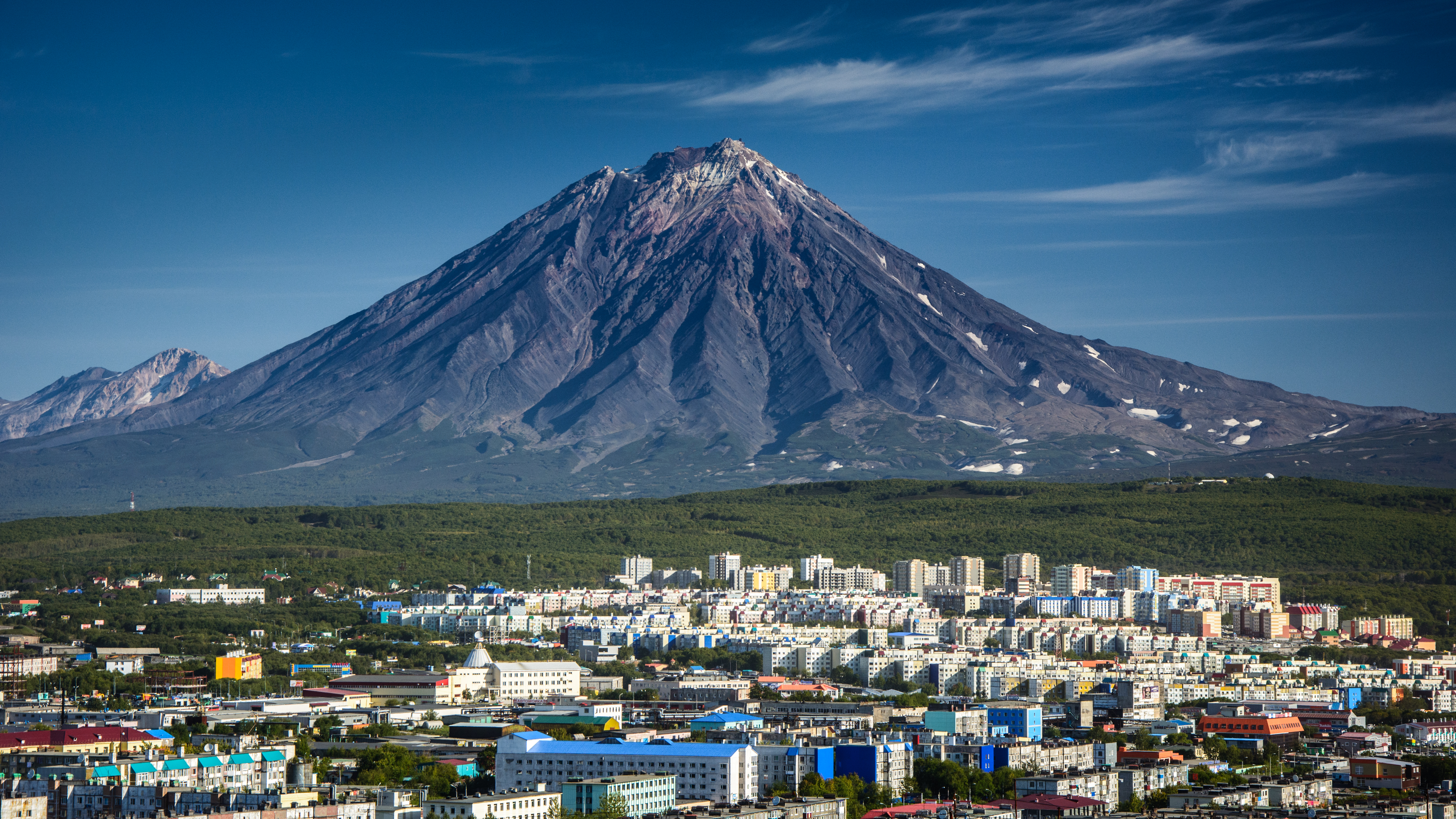 Koryaksky Volcano in Kamchatka, Russia.